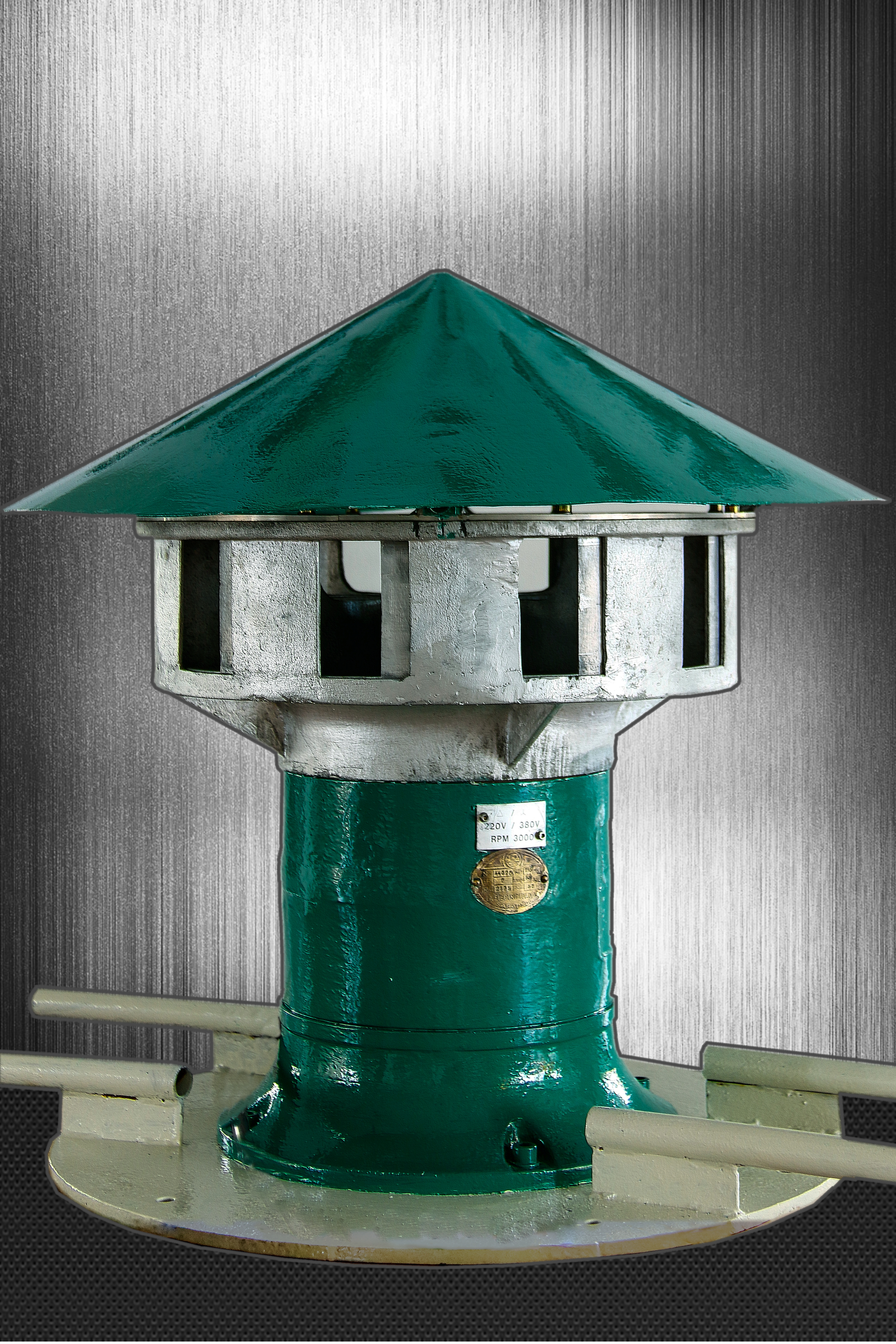 Sirena d'alarma antiaèria de la fàbrica de pistoles d'Unceta y Cía, Guernica, de la Guerra Civil espanyola (ca. setembre-novembre de 1936) i fabricada als tallers de La Electricidad, SA de Sabadell (autor: Toribio Manuel Beares Santerbas / Gernikazarra)